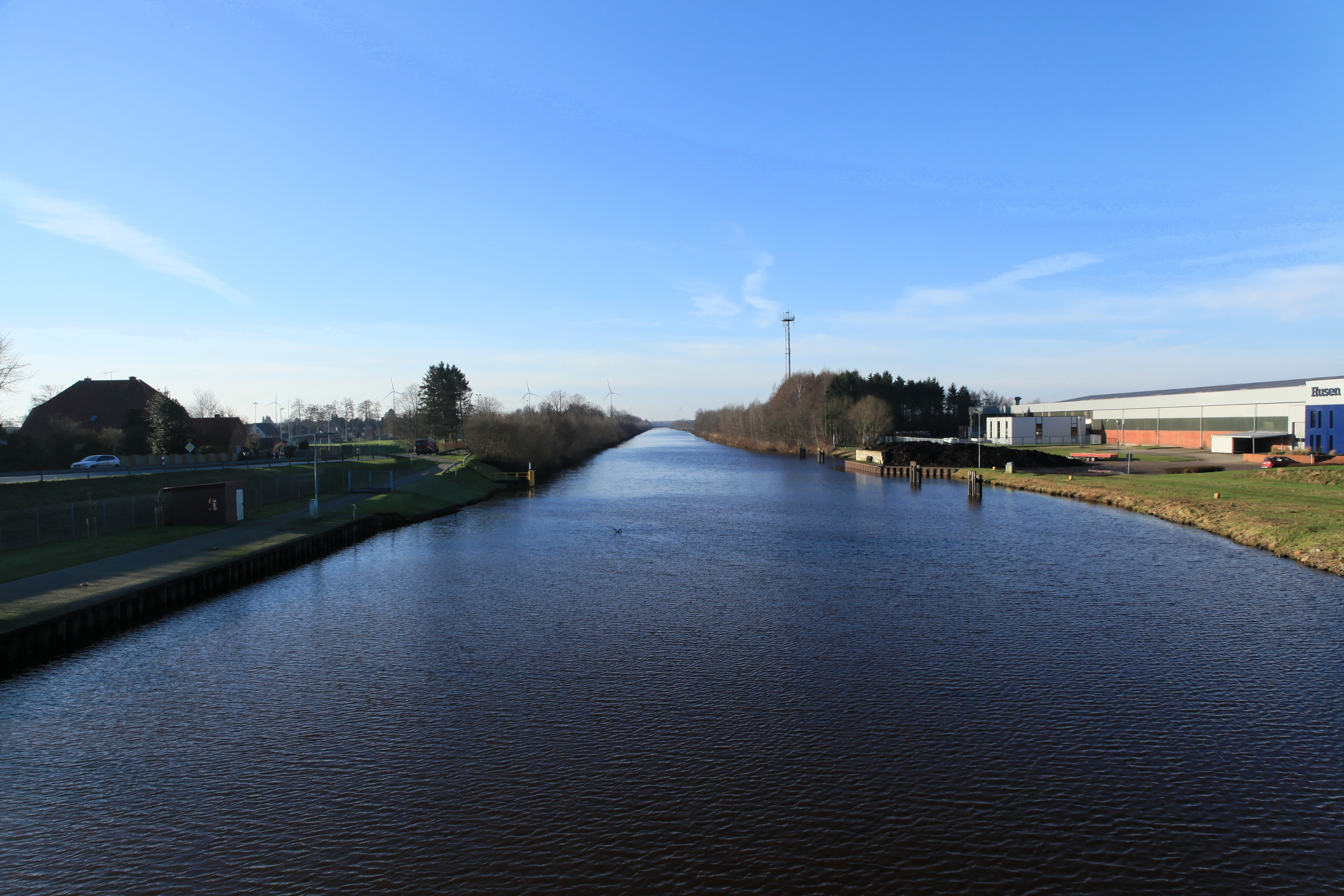 Blick von der Kanalbrücke der Papenburger Straße auf den Küstenkanal zwischen Am Küstenkanal (B401) und Hafen mit Husen Stahlbau in Surwold